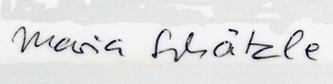 Maria Schätzle. Signatur ihrer handschriftlichen Karte an mich vom 23. April 1990.